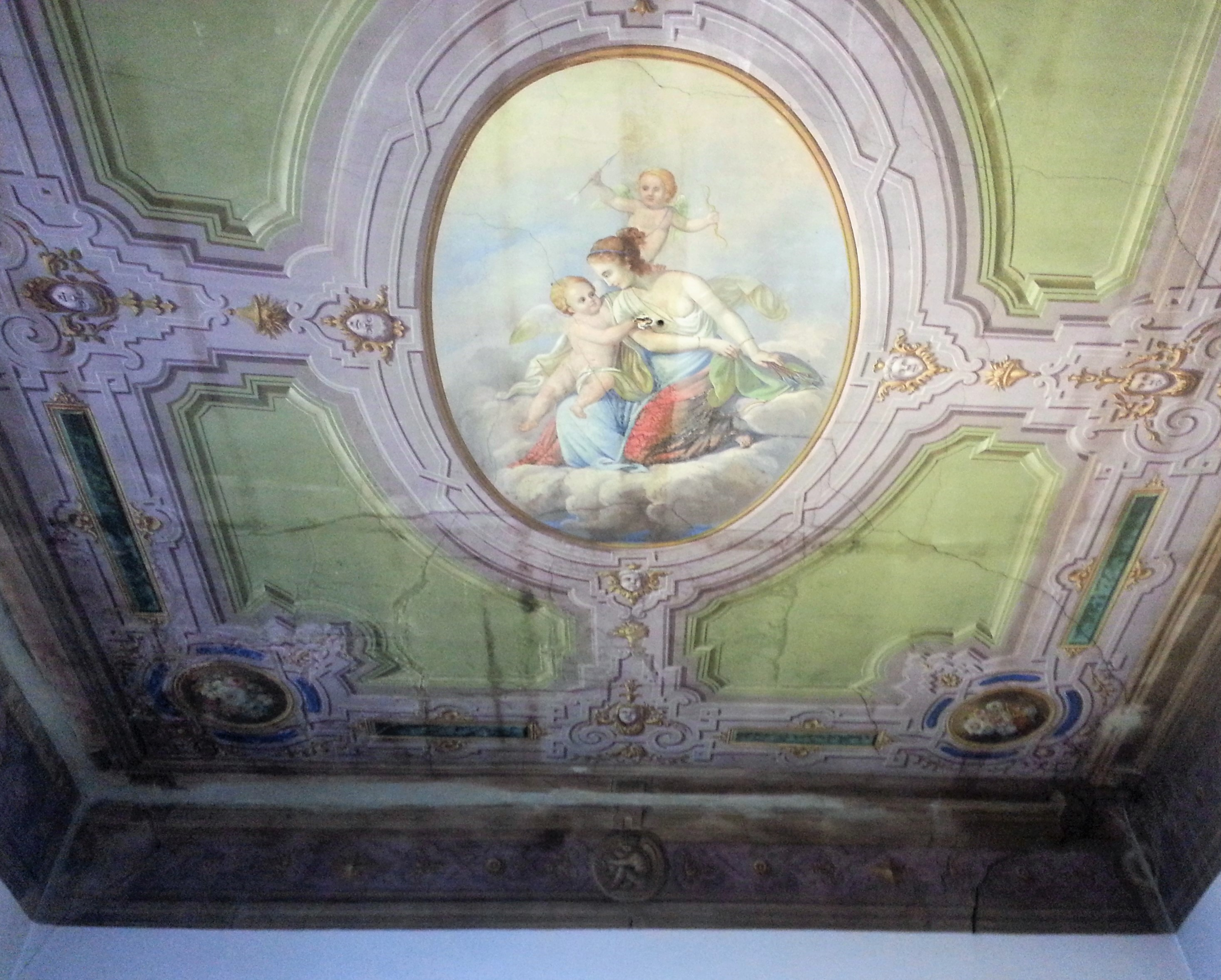 Venere e Cupido affresco del XVII secolo raffigurante Venere e Cupido